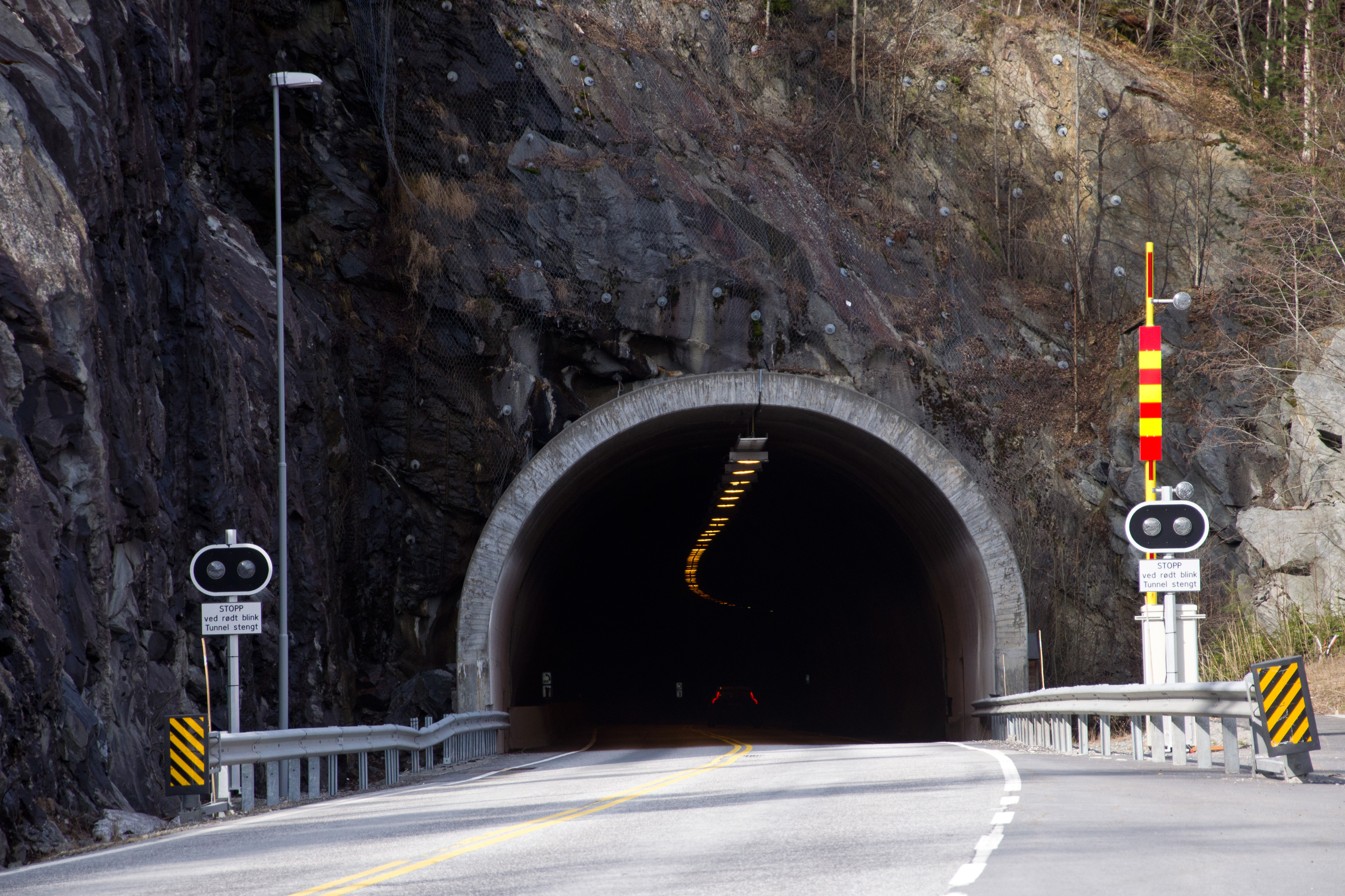 Presturatunnelen på fylkesvei 37 i Notodden kommune